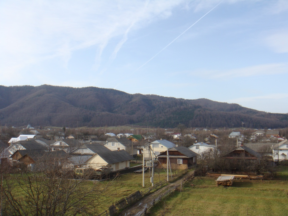 Сливки